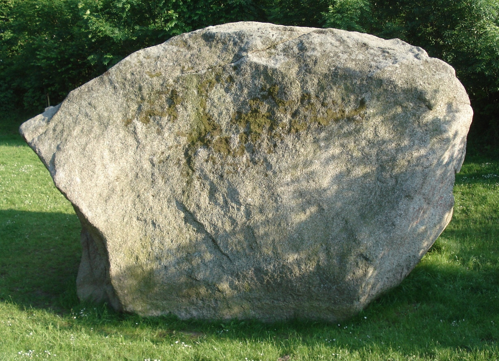 Duevelstein-Teufelsstein-Grosskoenigsfoerde - N